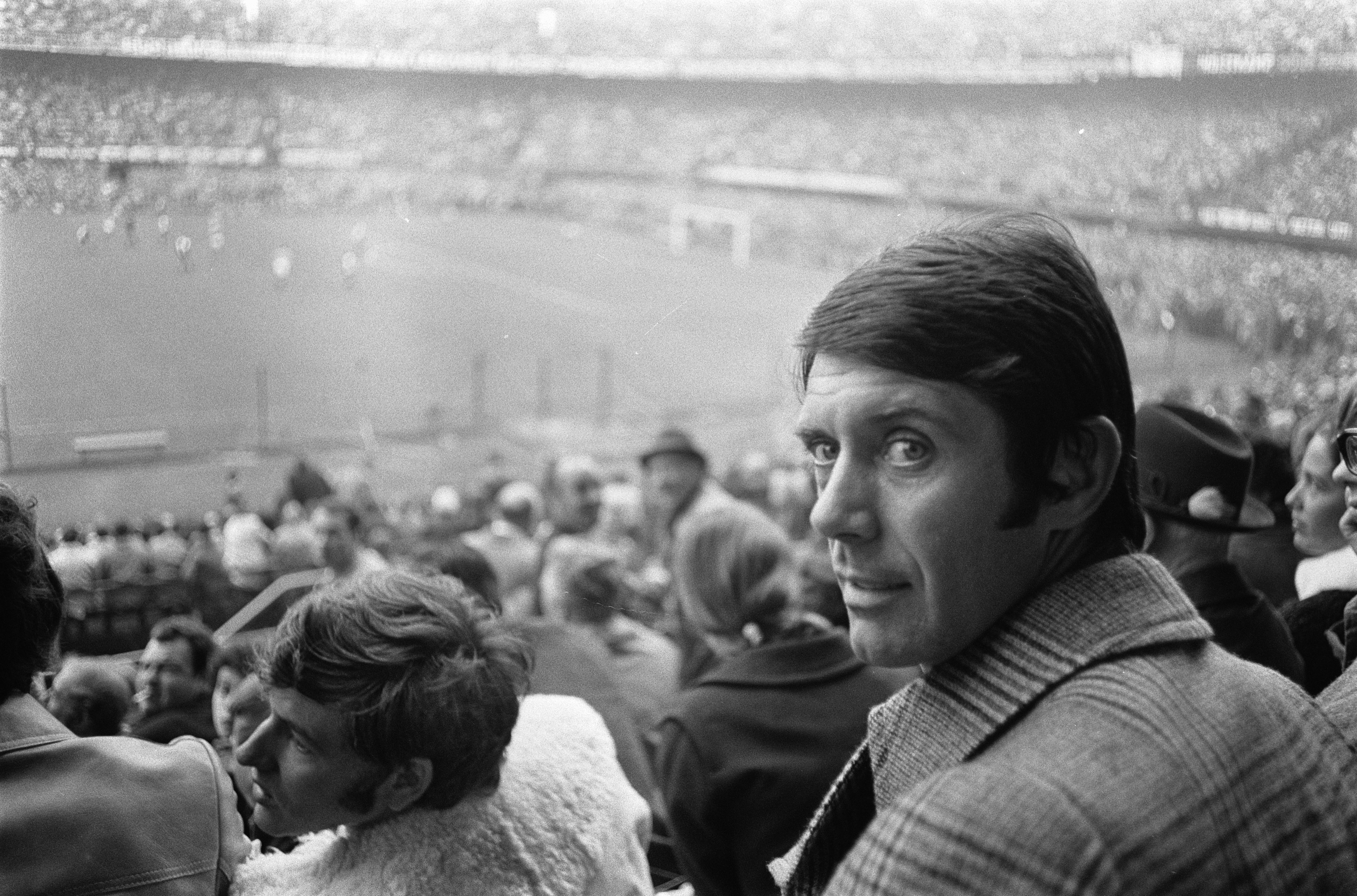 Collectie / Archief : Fotocollectie Anefo Reportage / Serie : [ onbekend ] Beschrijving : Feyenoord tegen Ajax 1-0. Hulptrainer Maldini van AC Milan op tribune Datum : 2 november 1969 Trefwoorden : sport, tribunes, voetbal Persoonsnaam : Maldini Instellingsnaam : AC Milaan, Feyenoord Fotograaf : Koch, Eric / Anefo Auteursrechthebbende : Nationaal Archief Materiaalsoort : Negatief (zwart/wit) Nummer archiefinventaris : bekijk toegang 2.24.01.05 Bestanddeelnummer : 922-9321